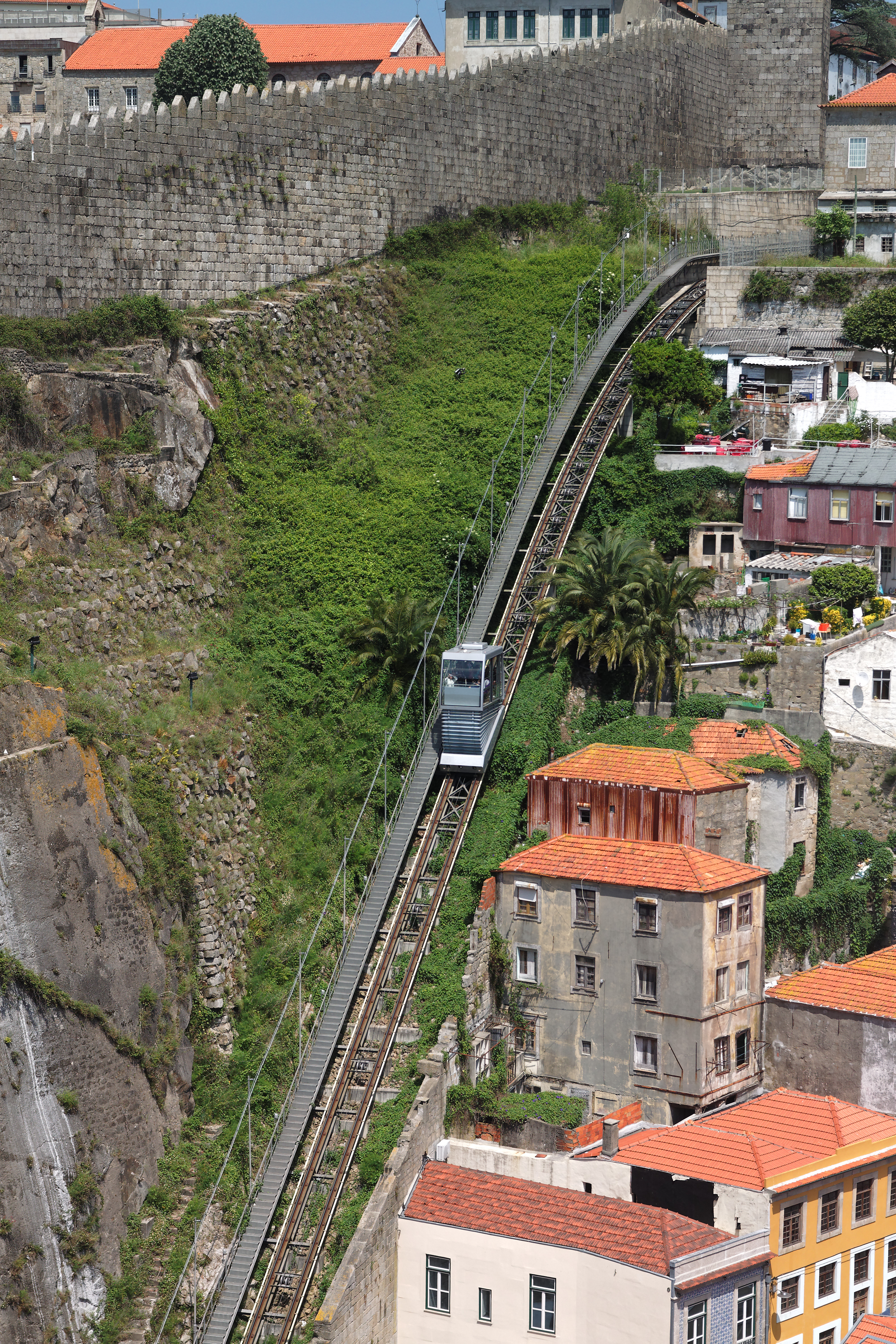 Funicular dos Guindais. Oporto, Portugal.